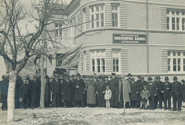 Откриването на клон на Варненска популярна банка в кв. Аспарухово, Варна. Сред официалните лица са: Духовников – директор на банката, инж. Янко Мустаков (1891-1955; кмет на Варна през 1935-1943 г.), ген. Попов – началник на варненския гарнизон, Б. Абаджиев – председател на Варненската търговска камара, Теохариев – секретар на градския съвет, и др.